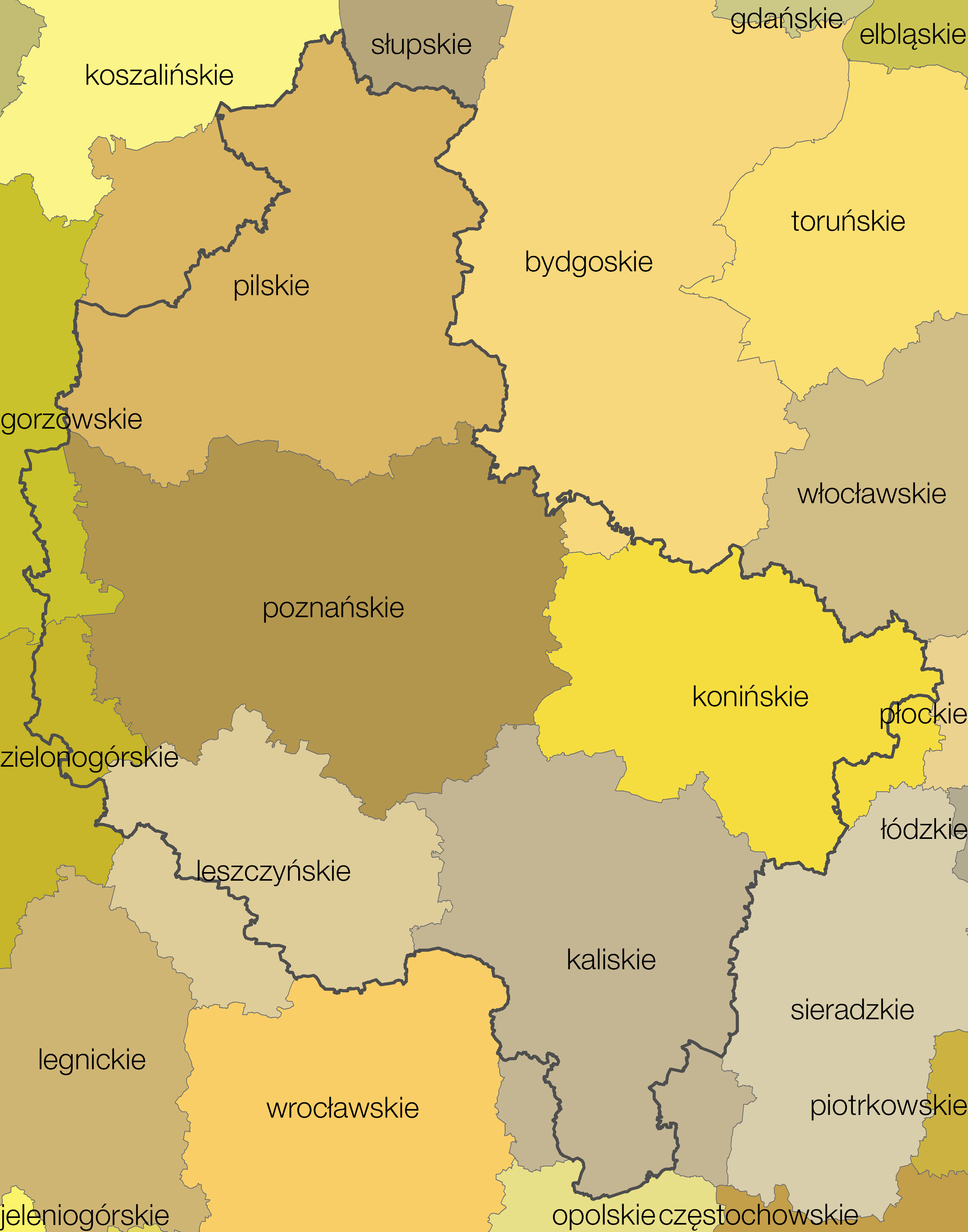 Województwo wielkopolskie (od 1999) jako powstałe z województw podziału administracyjnego Polski z lat 1975-1998